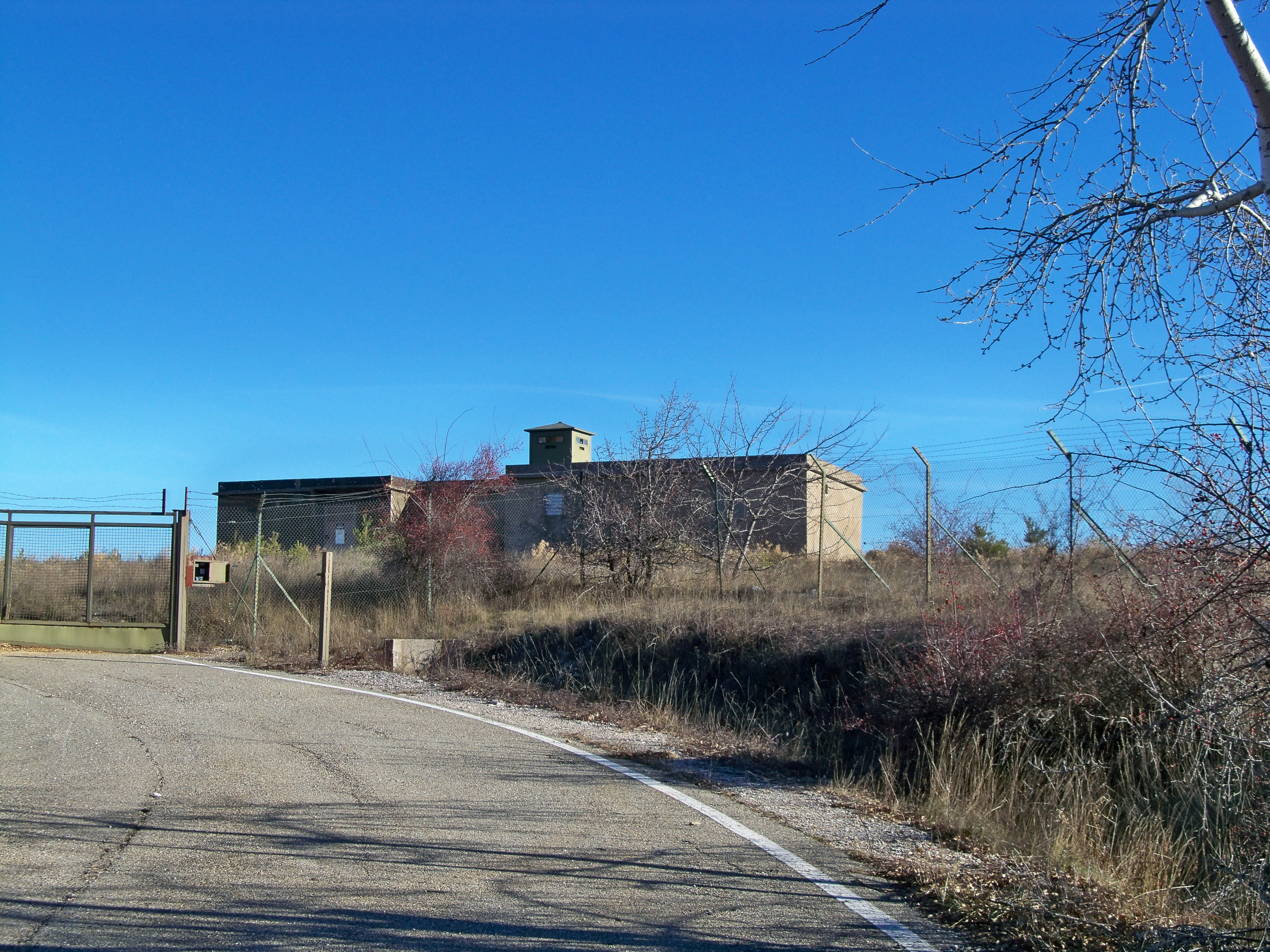 Silo militaire du Plateau d'Albion